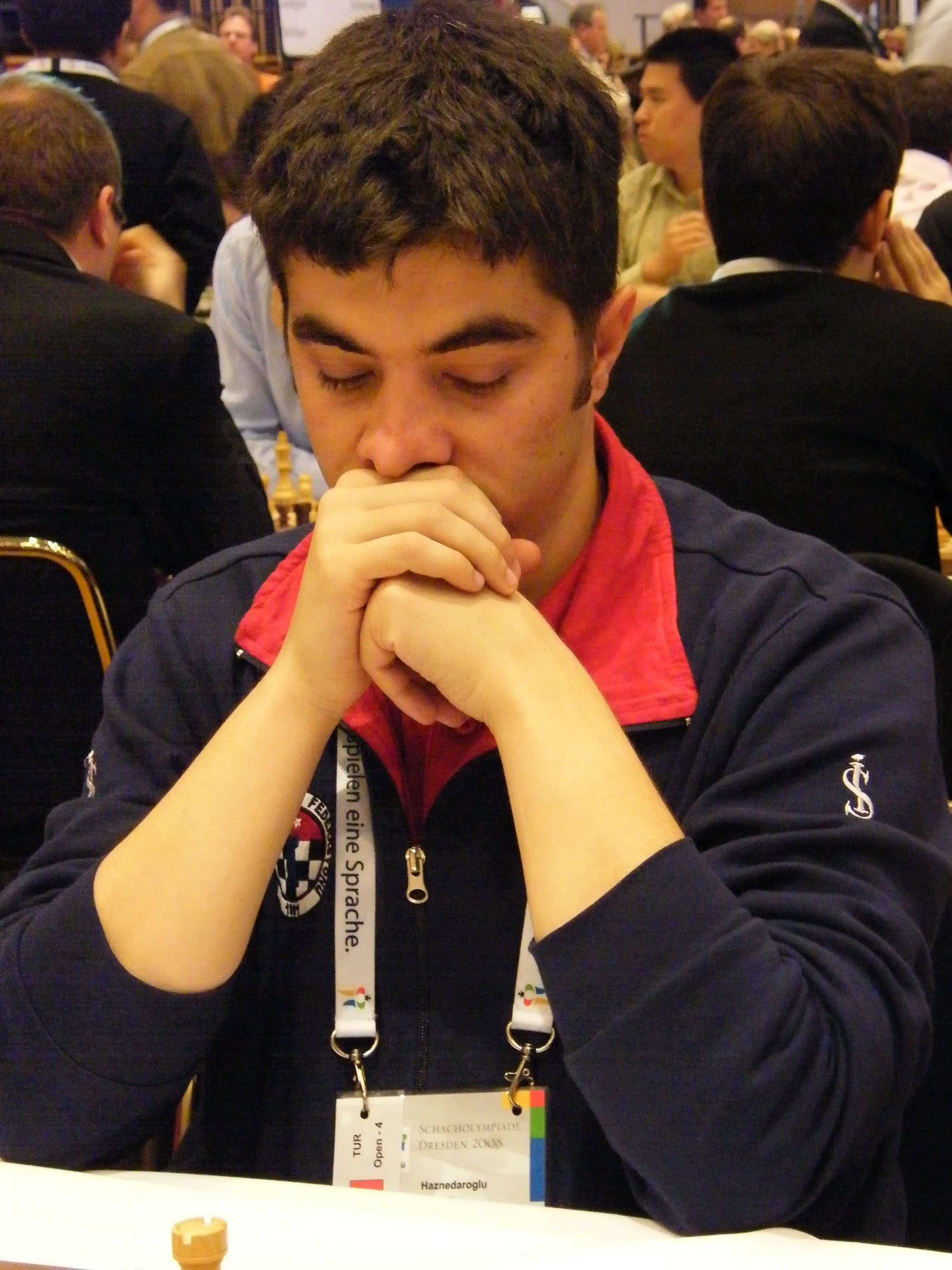 Kivanc Haznedaroglu bei der 38. Schacholympiade in Dresden 2008